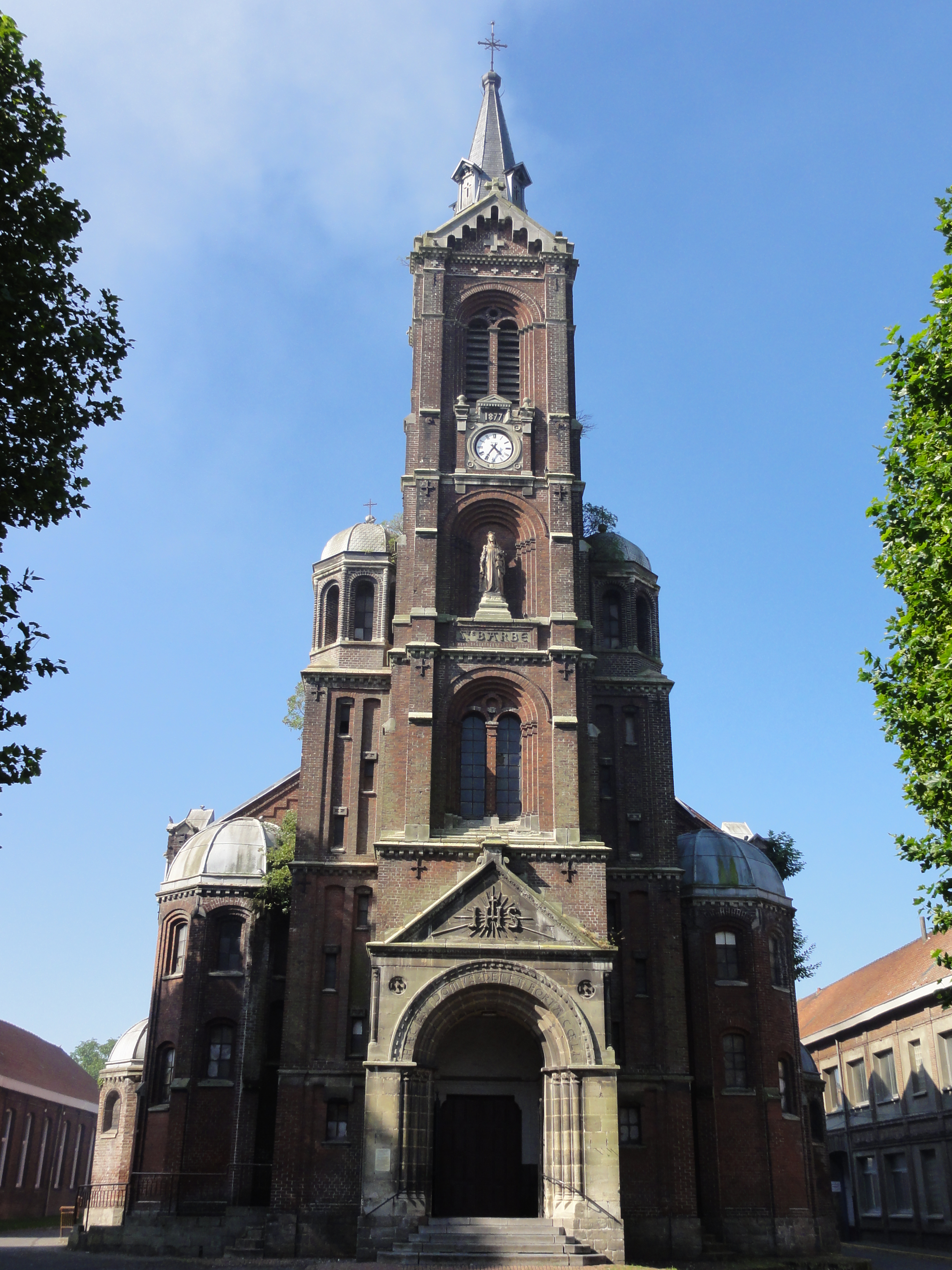 Église Sainte-Barbe des cités de la fosse n° 1 - 1 bis de la Compagnie des mines de Nœux dans le bassin minier du Nord-Pas-de-Calais, Nœux-les-Mines, Pas-de-Calais, Nord-Pas-de-Calais, France. .